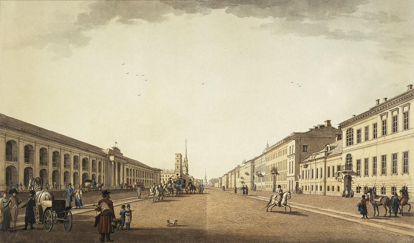 Saint Petersburg (Russia), Nevsky Prospekt.label QS:Lru,"Санкт-Петербург. Невский проспект. Невский проспект у Гостиного двора. 61.2x96.3 см. Государственный Эрмитаж." label QS:Lfr,"Saint-Pétersbourg. Perspective Nevski." label QS:Len,"Saint Petersburg (Russia), Nevsky Prospekt."